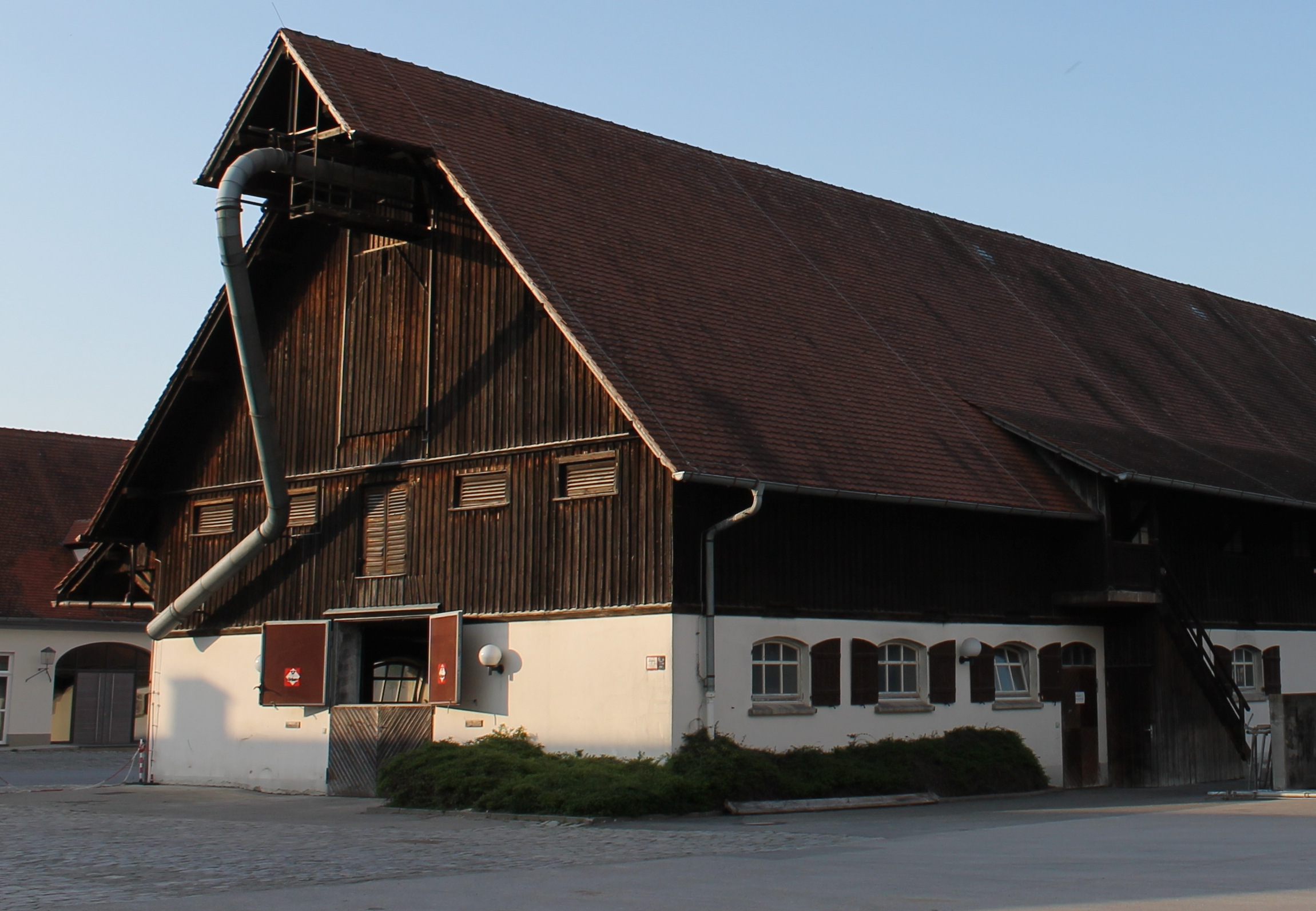 Alter Kuhstall der Landwirtschaftlichen Lehranstalten Triesdorf